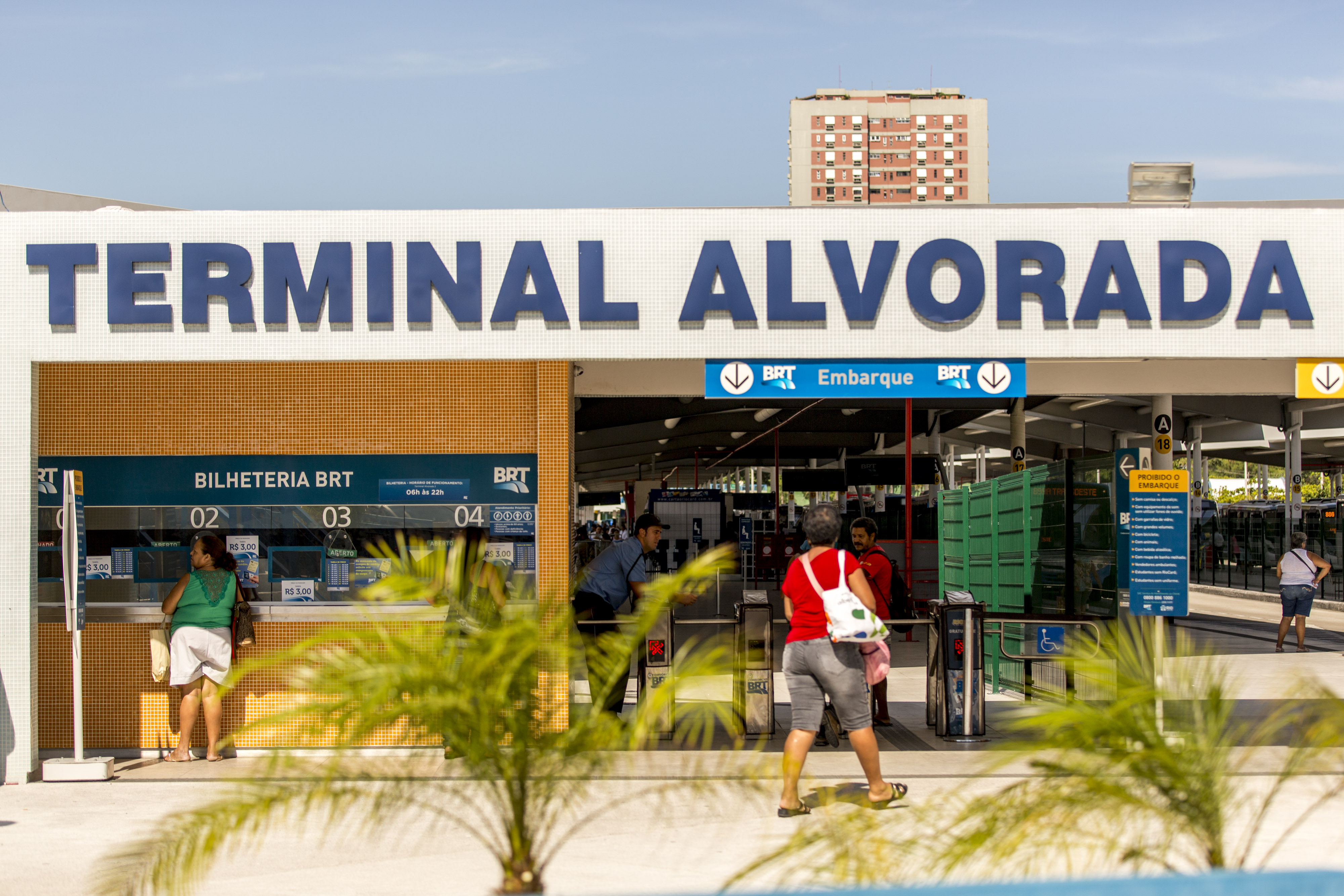 Terminal Alvorada, Rio de Janeiro.